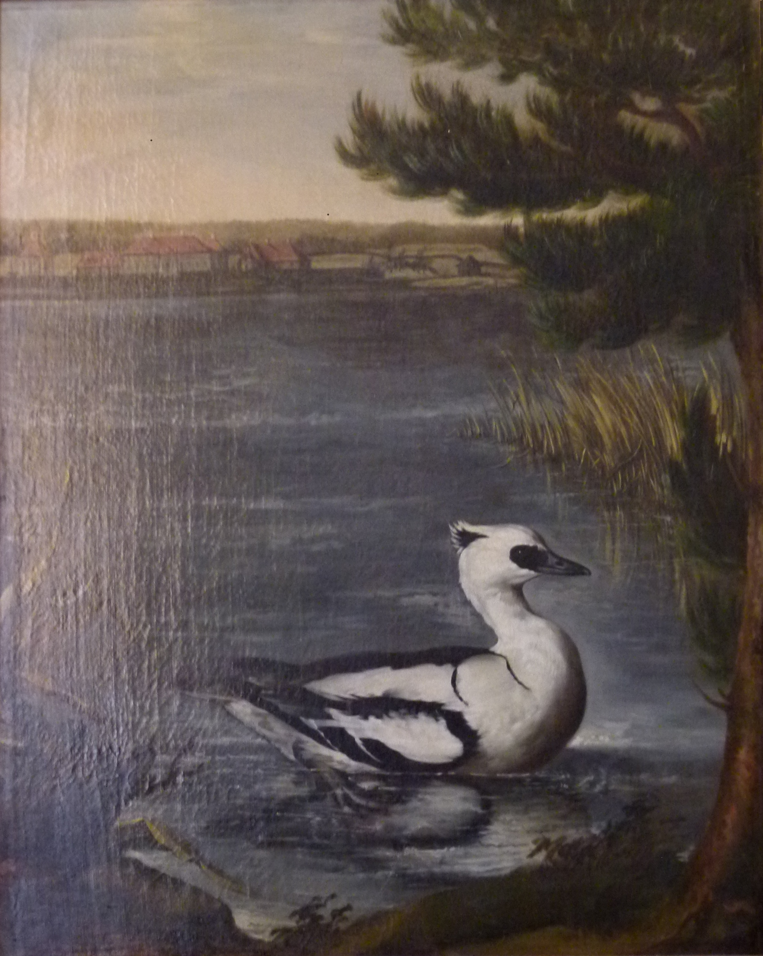 Das Bild zeigt im Hintergrund die älteste bekannte Darstellung des Schlosses Caputh. This photo was taken during the project GLAM on Tour im Schloss Caputh in September 2015. The making of this document was supported by Wikimedia Germany and Prussian Palaces and Gardens Foundation Berlin-Brandenburg. Impressionen aus dem Schloss Caputh.